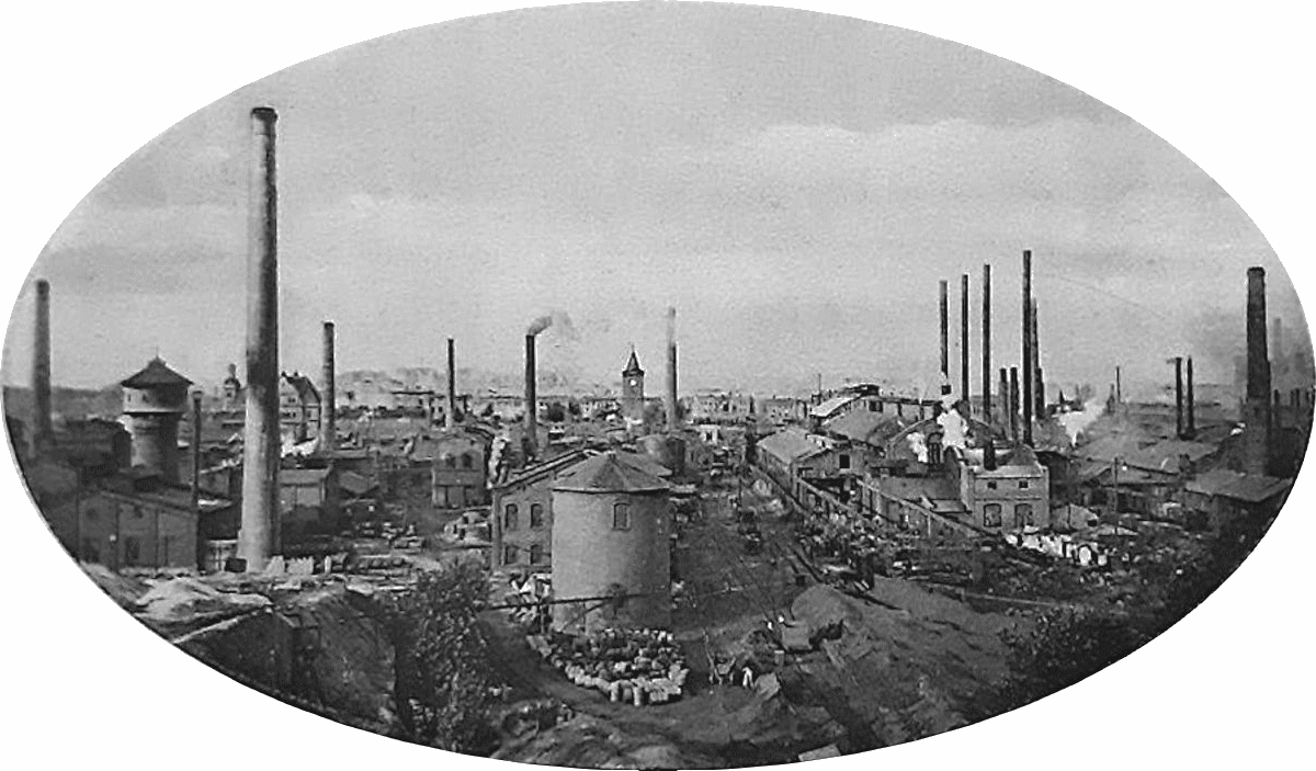 fabryka chemiczna produktów smołowych Rudolfa Rütgersa w Bismarckhütte